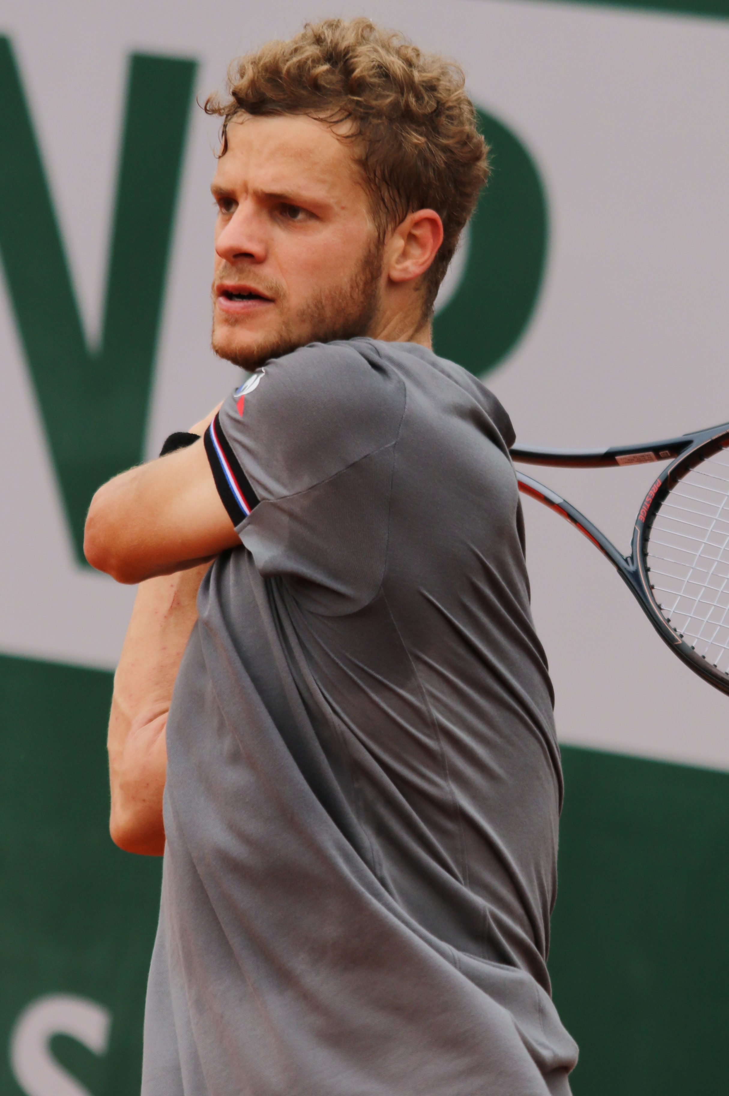 Hanfmann RGQ19 (23)